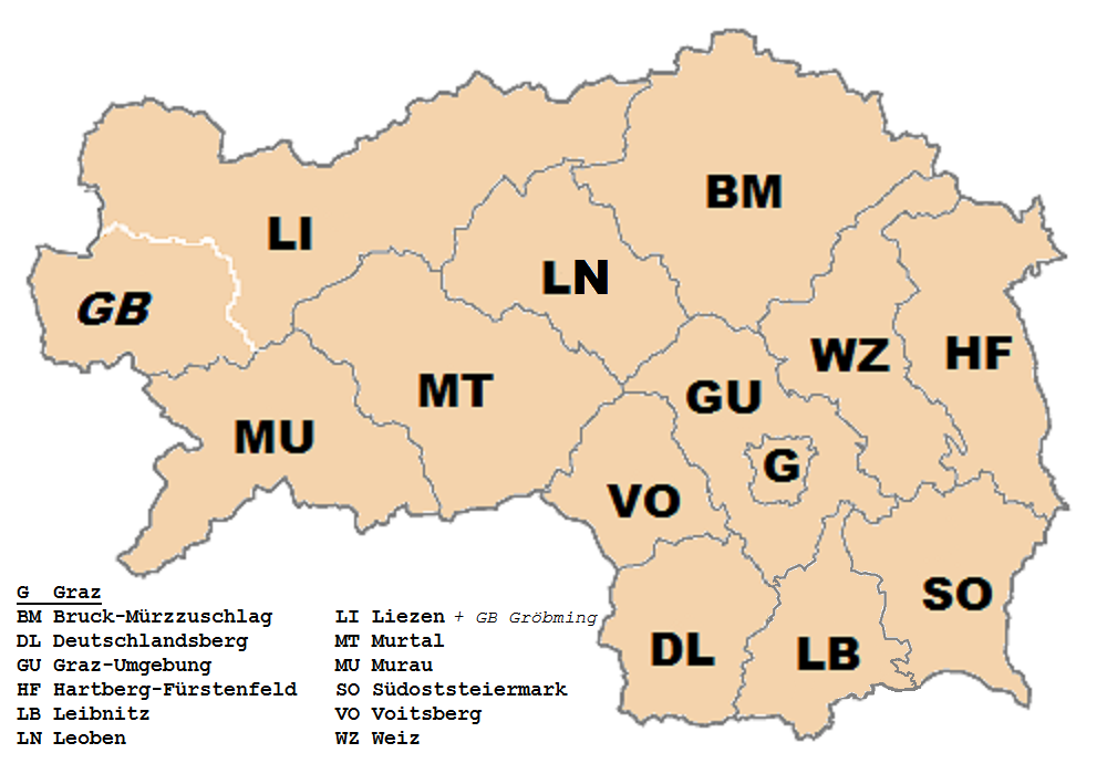 Karte der Steiermark mit Bezirksgrenzen Sonstiges: Darf frei verwendet werden.